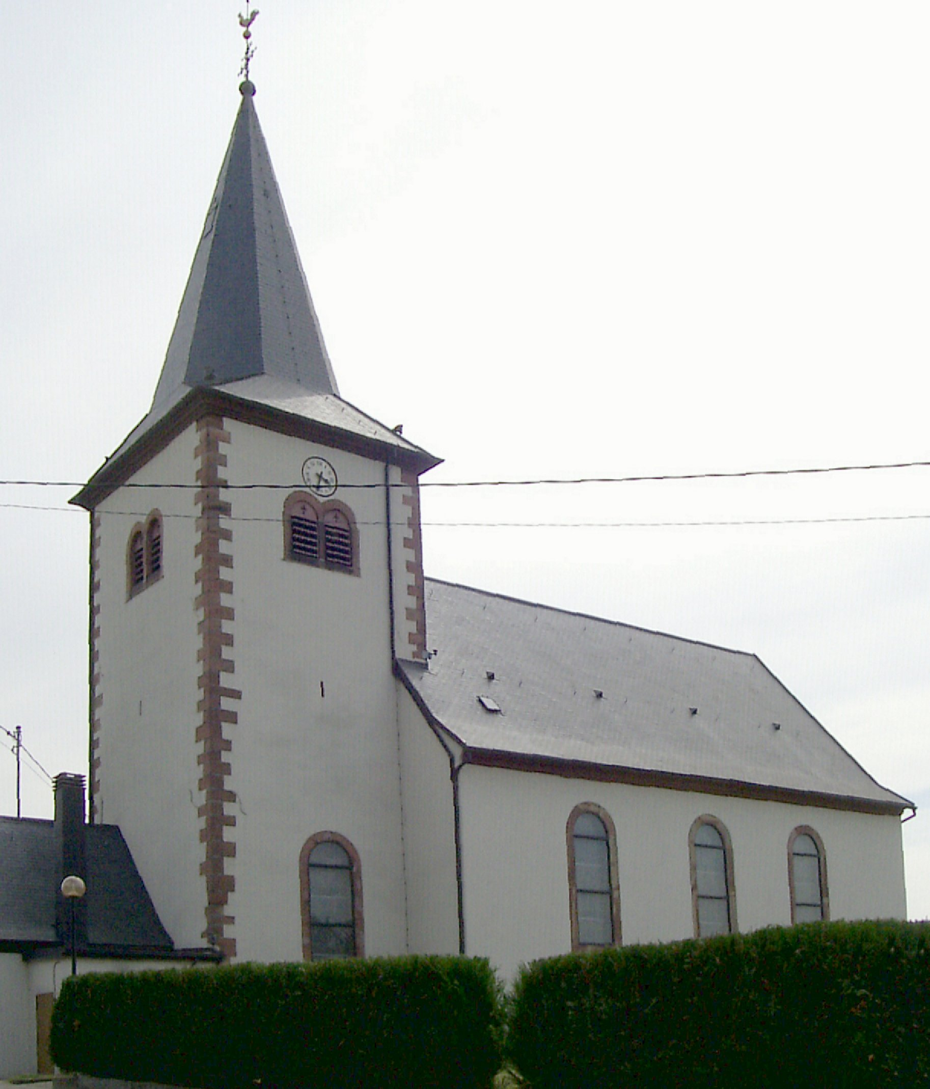 L'église Saint-Vincent à Huttendorf